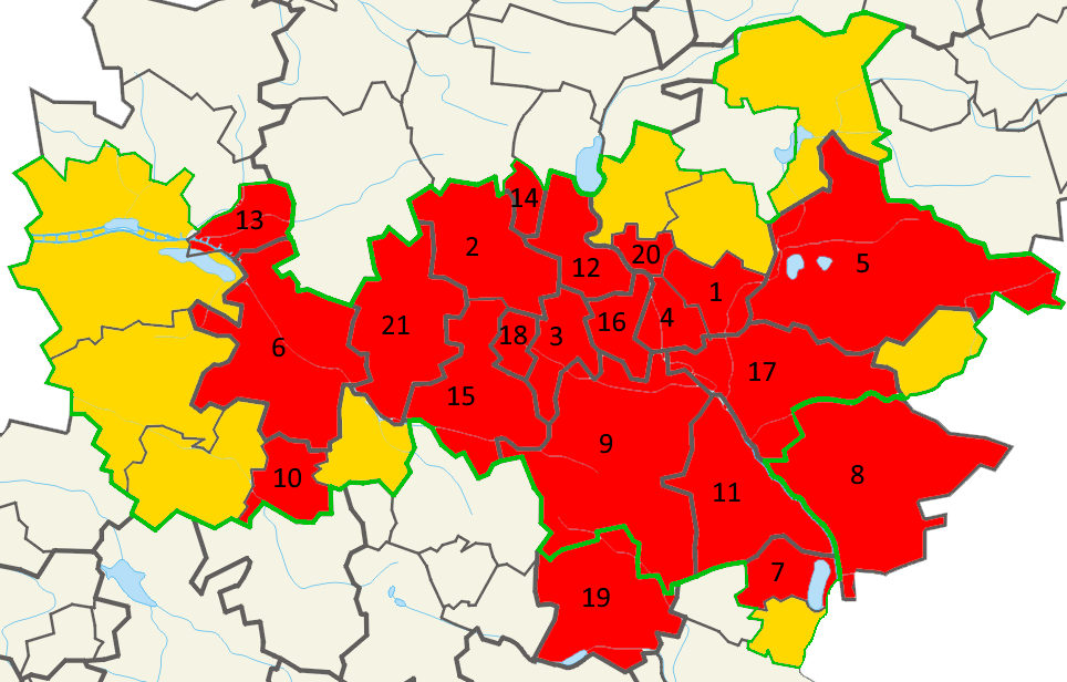 Obszar obowiązywania Śląskiej Karty Usług Publicznych Miasta/gminy uczestniczące w projekcie ŚKUP Miasta/gminy będące członkami KZK GOP, które nie uczestniczą w projekcie Granica gmin będących członkami KZK GOP Zastosowane skróty: Będzin, Bytom, Chorzów, Czeladź, Dąbrowa Górnicza, Gliwice, Imielin, Jaworzno, Katowice, Knurów, Mysłowice, Piekary Śląskie, Pyskowice, Radzionków, Ruda Śląska, Siemianowice Śląskie, Sosnowiec, Świętochłowice, Tychy, Wojkowice, Zabrze